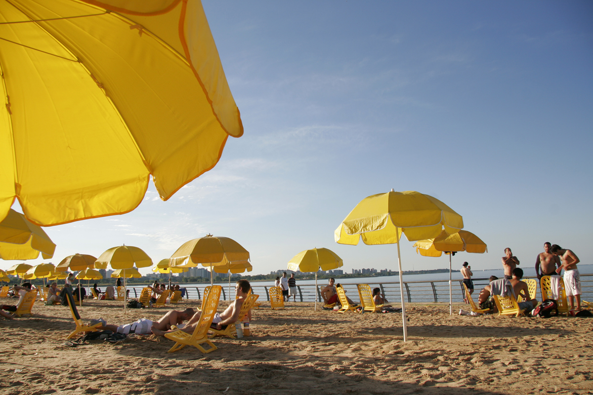 Buenos Aires Playa